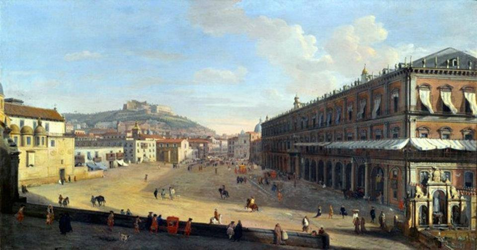 Napoli, il Largo di Palazzo (attuale Piazza del Plebiscito), prima della sua sistemazione (lavori iniziati nel 1809). Sul lato sinistro della veduta si vedono una serie di edifici ecclesiastici sostituiti poi dal complesso di San Francesco di Paola. Da notare a sinistra la rampa del Convento della Croce e le facciate dei conventi di San Luigi di Palazzo e di Santo Spirito. Sulla destra vi è la " Fontana del Gigante ". L'opera di van Wittel è nota in almeno quattro esemplari, tutti fondati sul disegno preparatorio conservato a Napoli, nel Museo di San Martino: quello più vicino al dipinto di Intesa Sanpaolo, datato 1706, si trova nel Museo di Cincinnati (Ohio). Fu realizzato a Roma: l'artista olandese vi si era nuovamente trasferito dopo che, nel 1702 era stato rimosso dall'incarico il viceré che lo aveva invitato a Napoli nel 1699, trasformandolo in una sorta di pittore di corte.